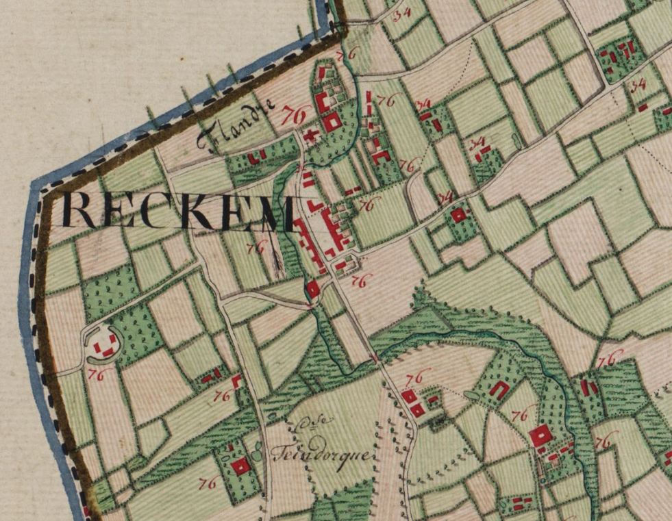 Reckem (aujourd'hui Rekkem) en Belgique sur la carte de Ferraris de 1777.